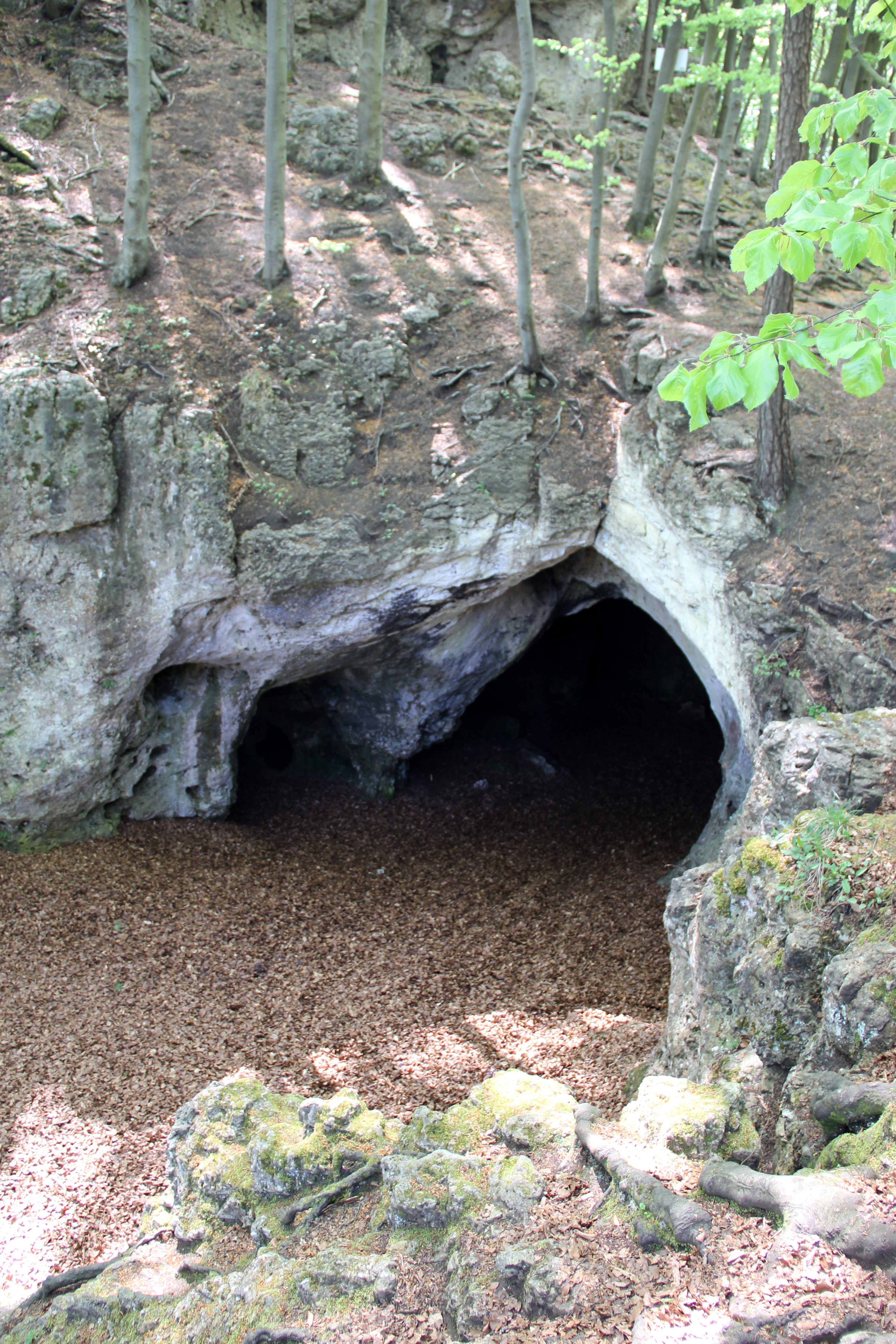 Durch Sprengungen künstlich geschaffenes Eingangsportal der Petershöhle